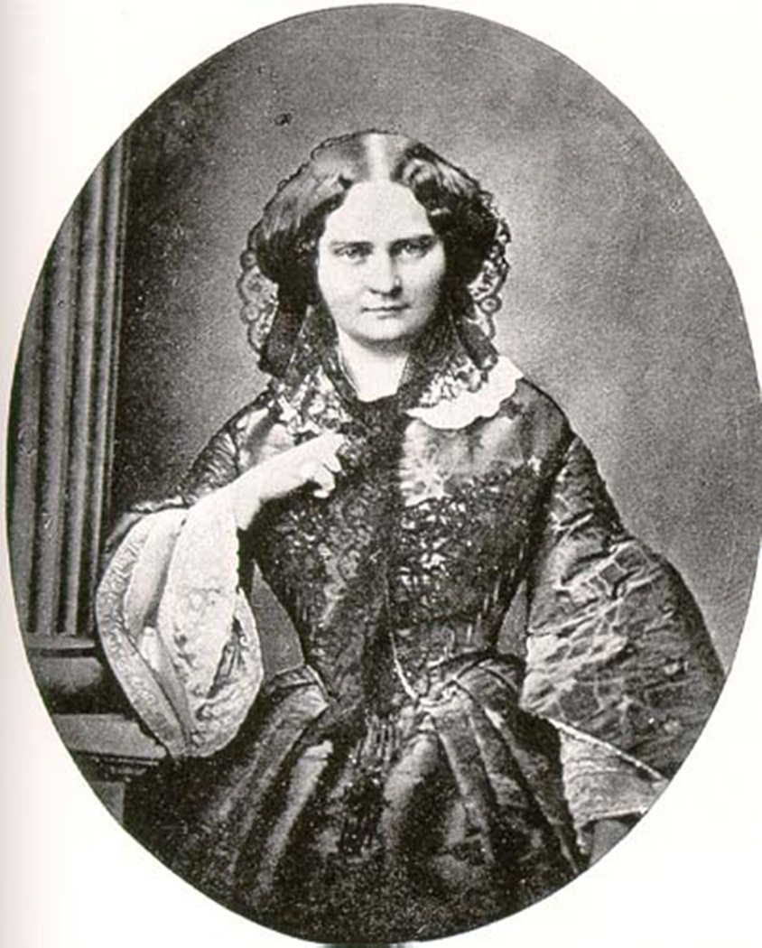 Mathilde Karoline von Bayern (1813–1862), Prinzessin von Bayern